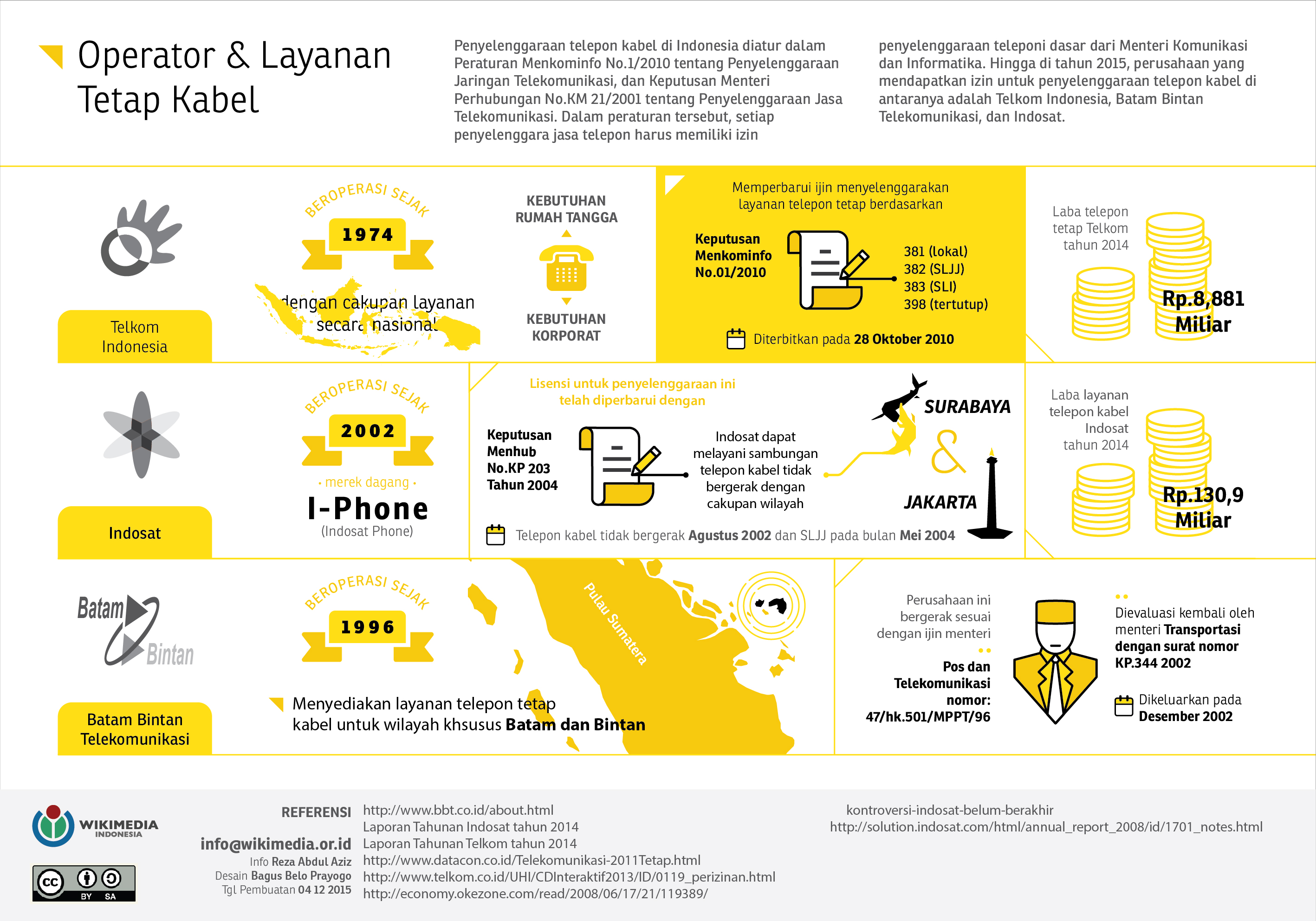 Indonesia memiliki tiga operator telepon kabel yaitu Telkom, Batam Bintan Telekomunikasi, dan Indosat. Infografis di atas menjelaskan tentang tiga operator tersebut dan masing-masing produk telepon kabel serta jangkauan operasinya. Info ini dibuat sebagai upaya untuk menginformasikan kepada publik tentang badan usaha telepon kabel di Indonesia.